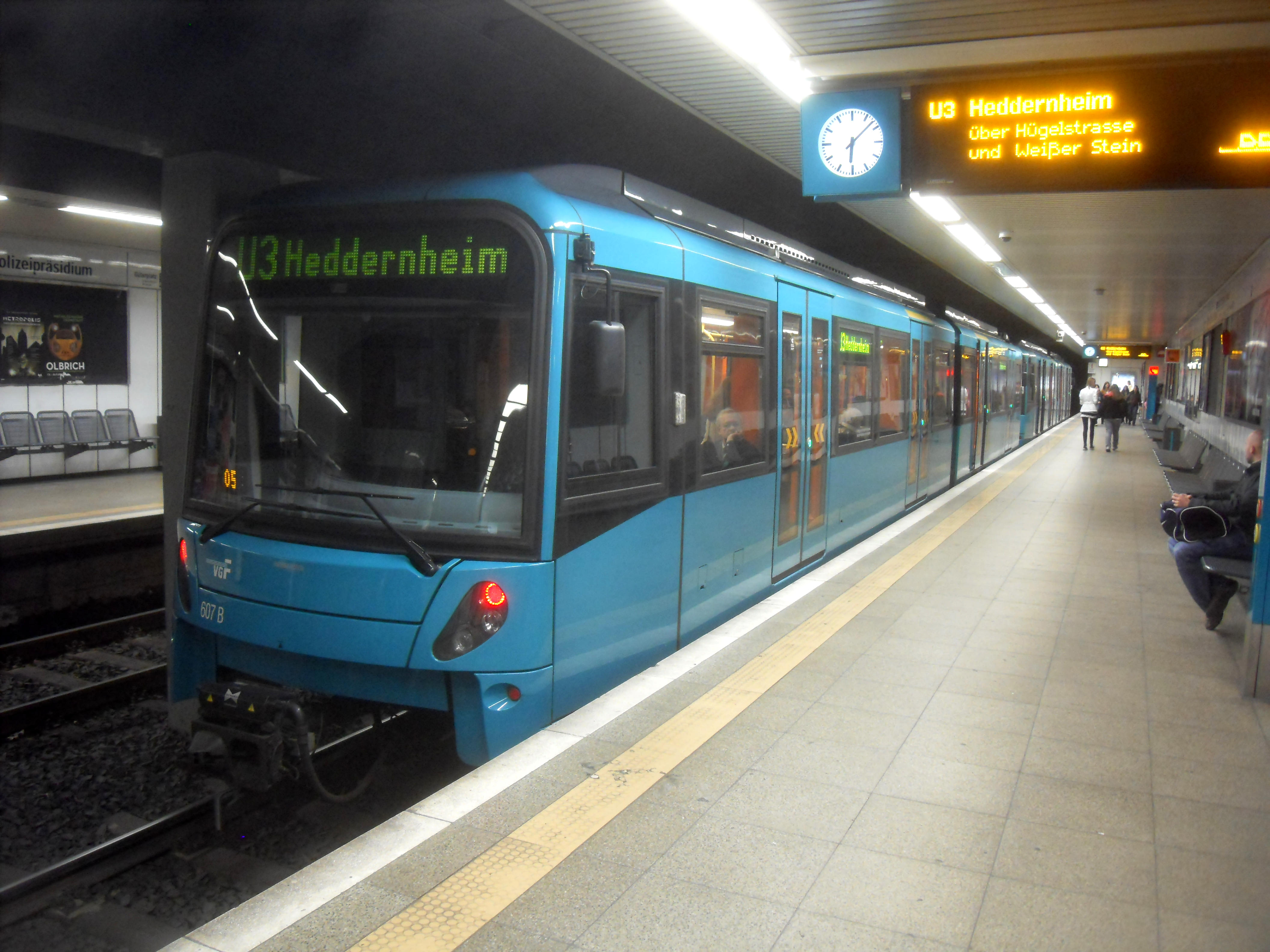 U 5-Triebwagen der U-Bahn Frankfurt im U-Bahnhof Miquel-/Adickesallee auf der Linie U 3 auf dem Weg nach Frankfurt-Heddernheim in Hessen (Deutschland)